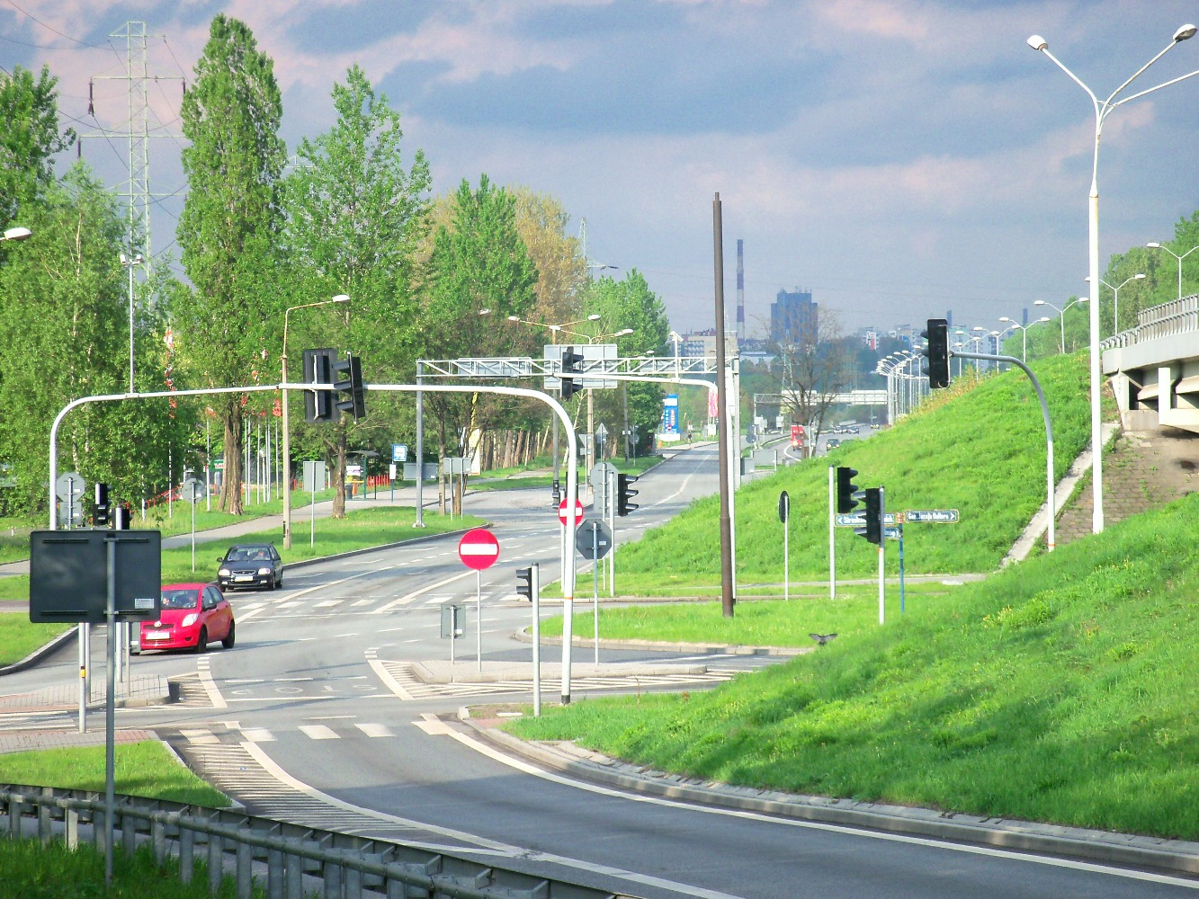 Węzeł drogowy w Katowicach - Dąbrówce Małej. Skrzyżowanie ul. gen. Józefa Hallera z aleją Walentego Roździeńskiego (strona północna)